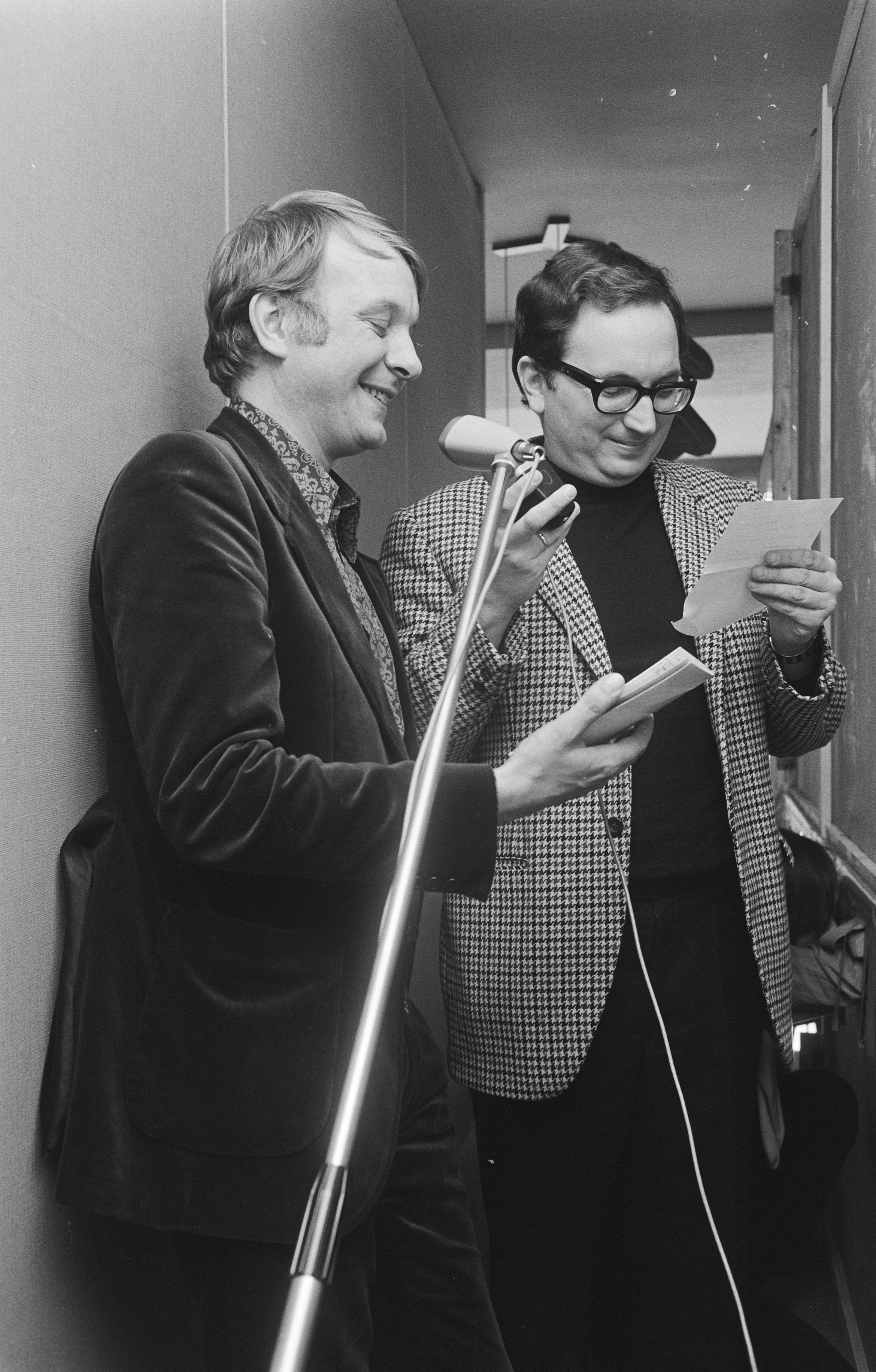 Collectie / Archief : Fotocollectie Anefo Reportage / Serie : Congres van de gezamenlijke secties beroepsonderwijs van de Algemene Beschrijving : Uitreiking van de Waterpomptang-trofee aan Ger Smit (l) en Frans van Dusschoten (r) in hun rol van Ed en Willem Bever [uit de Fabeltjeskrant] voor de wijze waarop deze de aandacht vestigen op de waarde van een beroepsopleiding Annotatie : Het Evert Kupersoord is het huidige hotel Tulip Inn Amersfoort Datum : 2 april 1971 Locatie : Amersfoort, Utrecht (provincie) Trefwoorden : bijeenkomsten, vakbonden Persoonsnaam : Dusschoten, Frans van, Smit, Ger Instellingsnaam : ABOP Fotograaf : Fotograaf Onbekend / Anefo Auteursrechthebbende : Nationaal Archief Materiaalsoort : Negatief (zwart/wit) Nummer archiefinventaris : bekijk toegang 2.24.01.05 Bestanddeelnummer : 924-4176